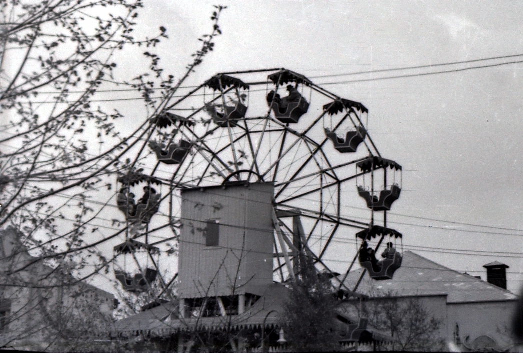 A régi óriáskerék a Budapesti Vidámparkban, kb. 1958